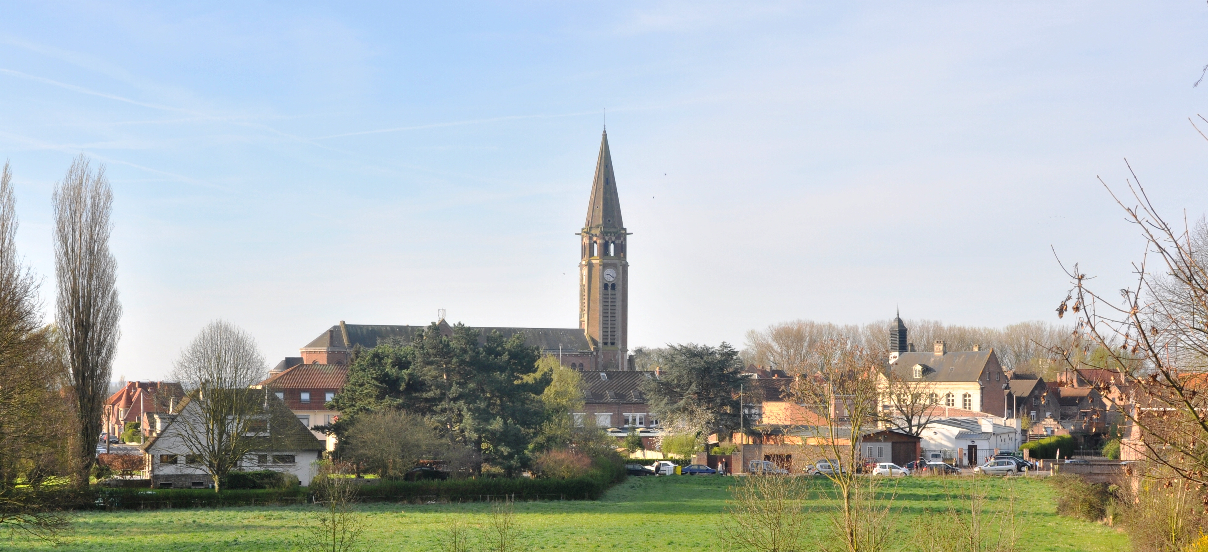 Saint-Venant, vue depuis la Lys navigable